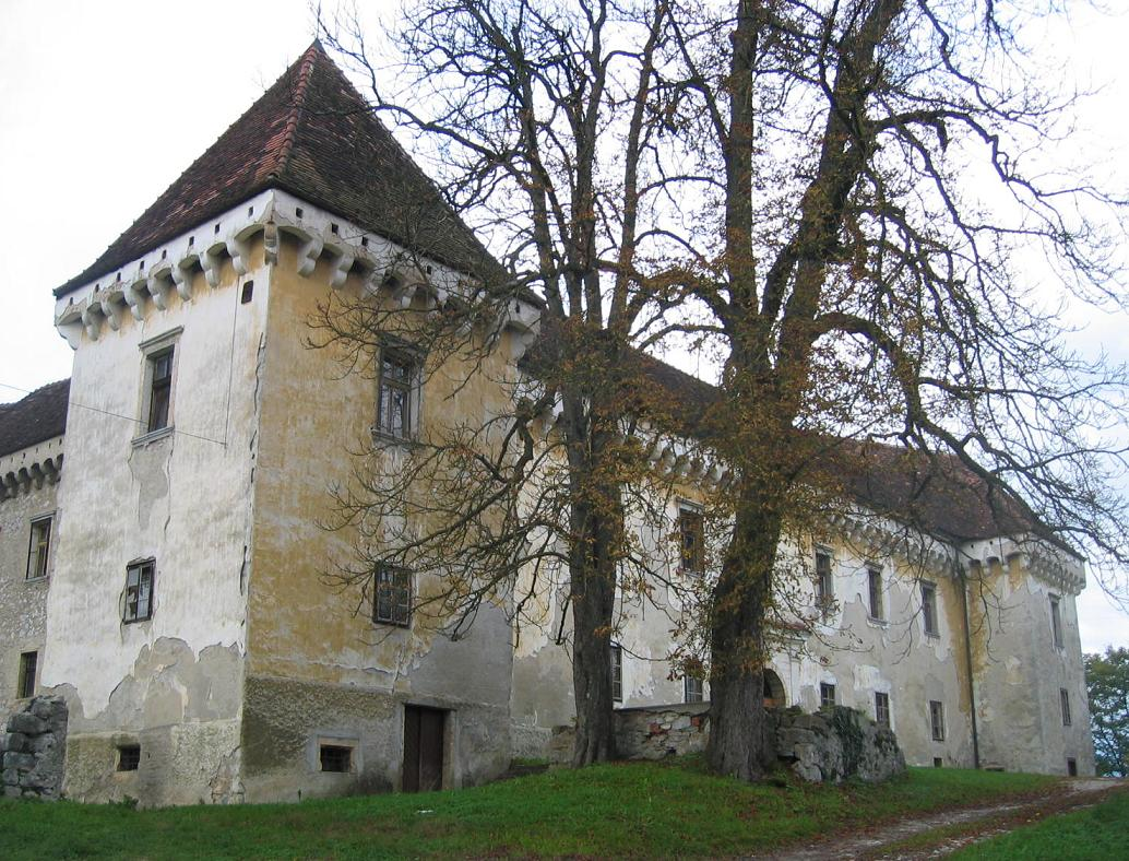 Grad Krumperk